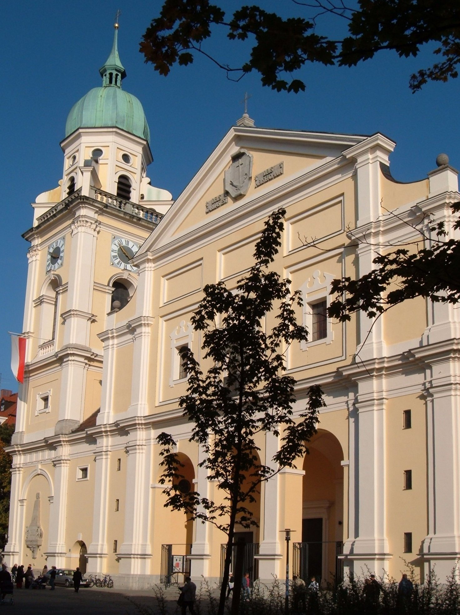 St. Joseph, München